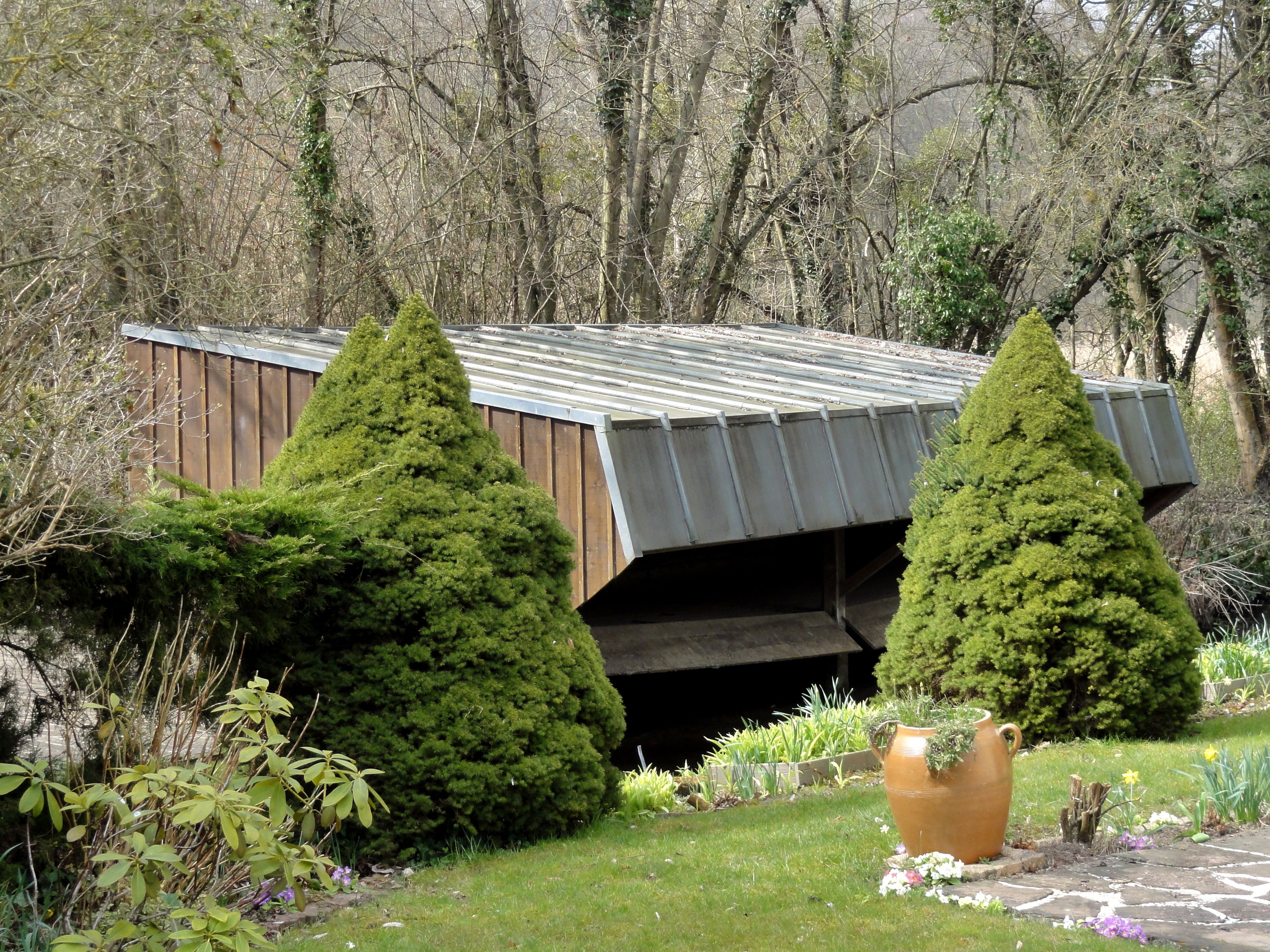 Lavoir sur la Viosne, rue du Moulin, près de la limite de la commune avec Courcelles-sur-Viosne.